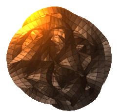 Calabi-Yau-Mannigfaltigkeit